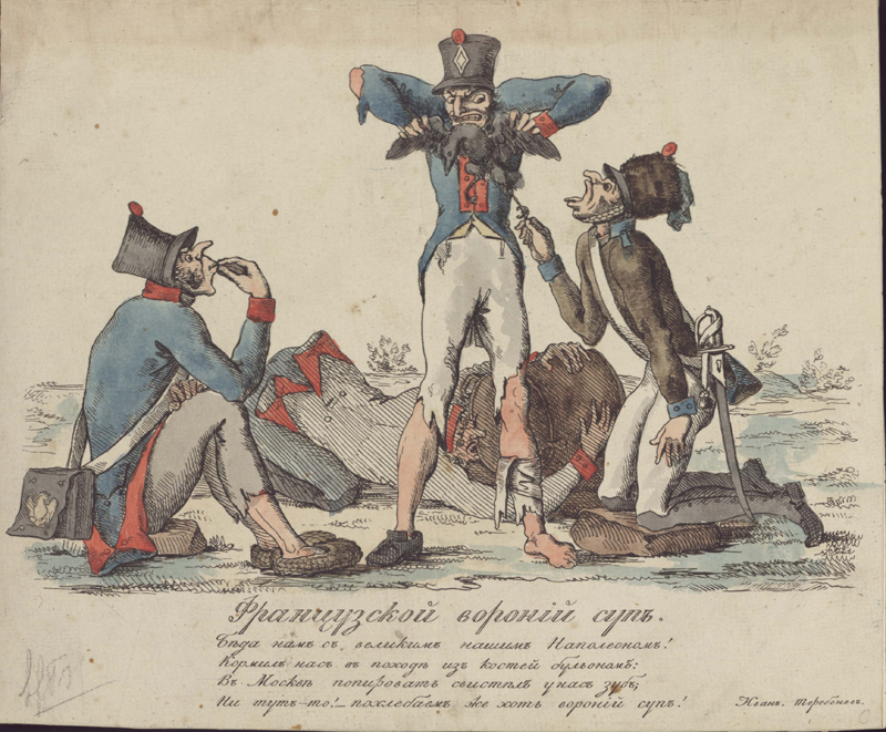 И.И. Теребенев. Французский вороний суп. [Петербург. 1813]